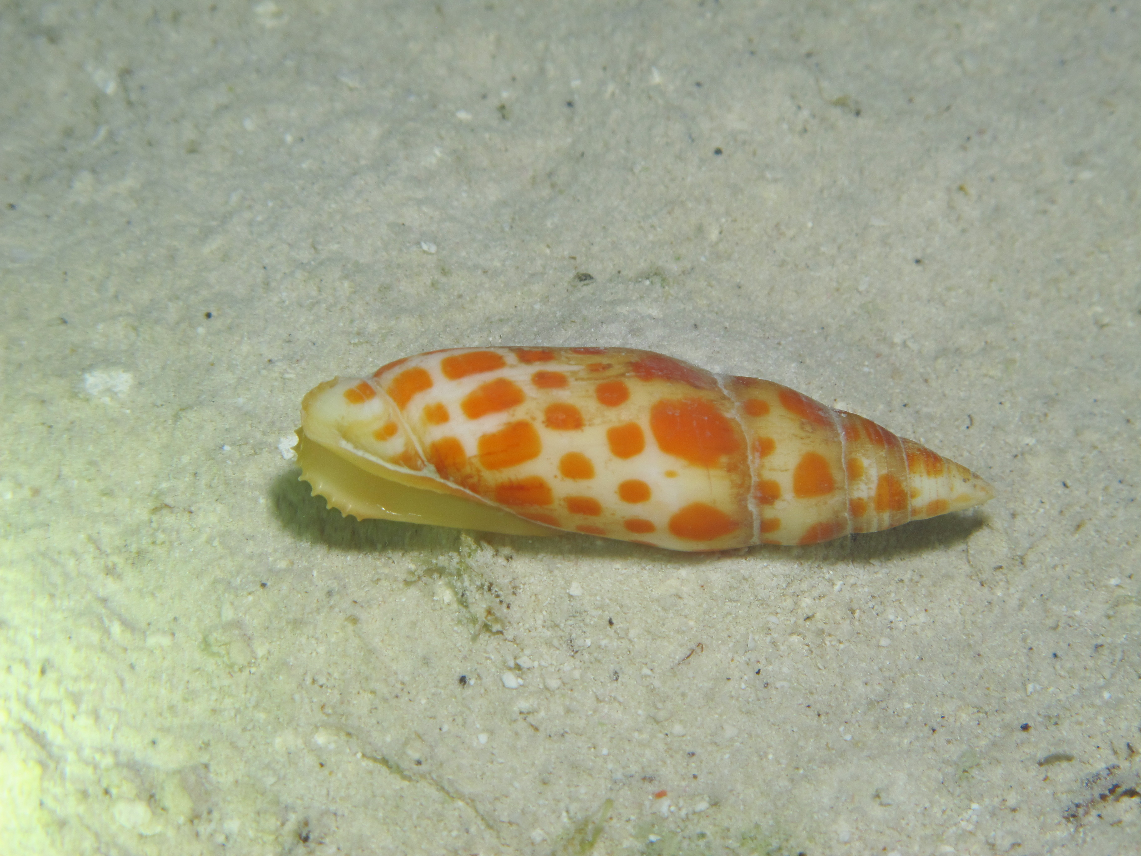 Une mitre géante (Mitra mitra) aux Maldives (atoll de Baa).